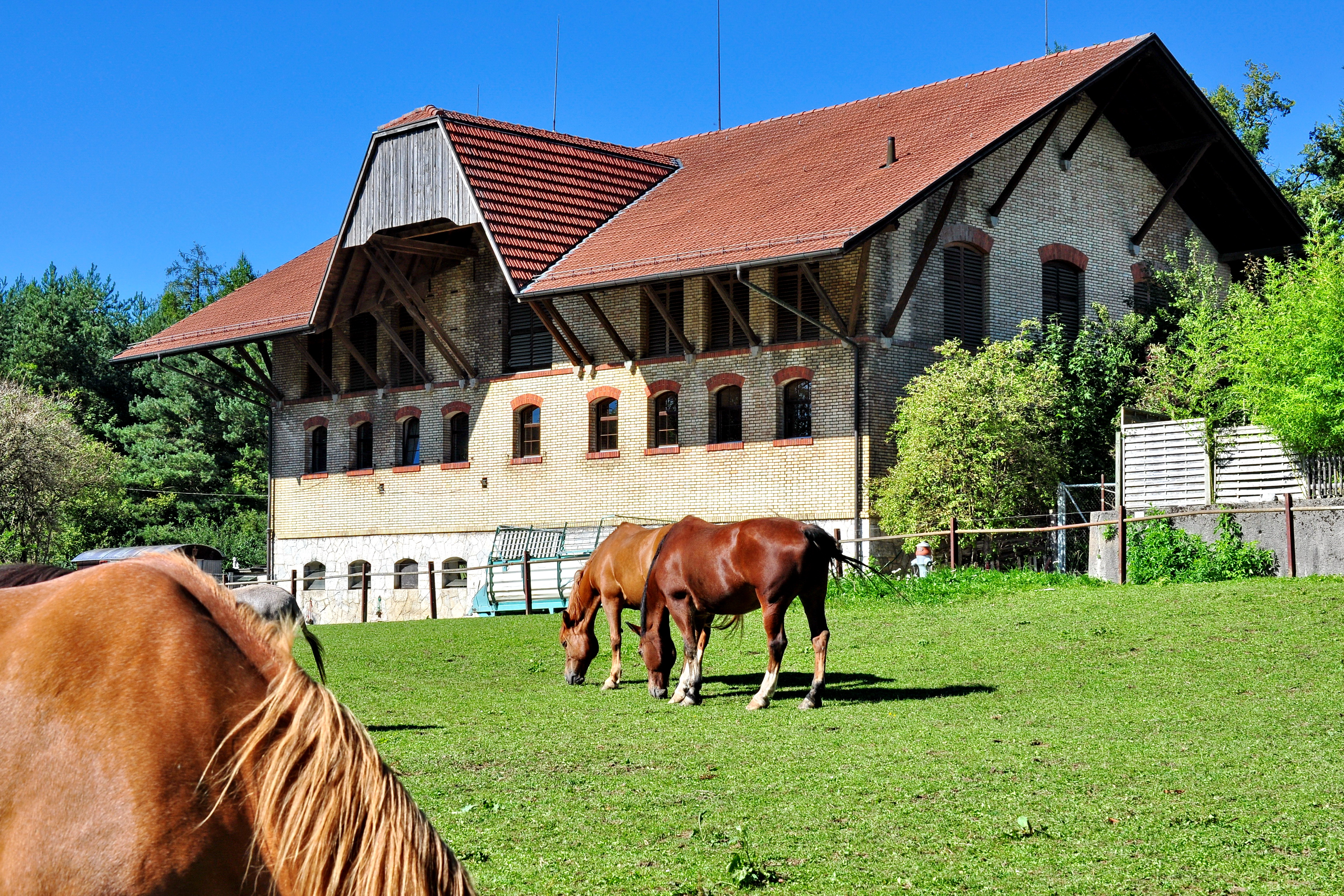 Gut Katzensee in Regensdorf (Switzerland)